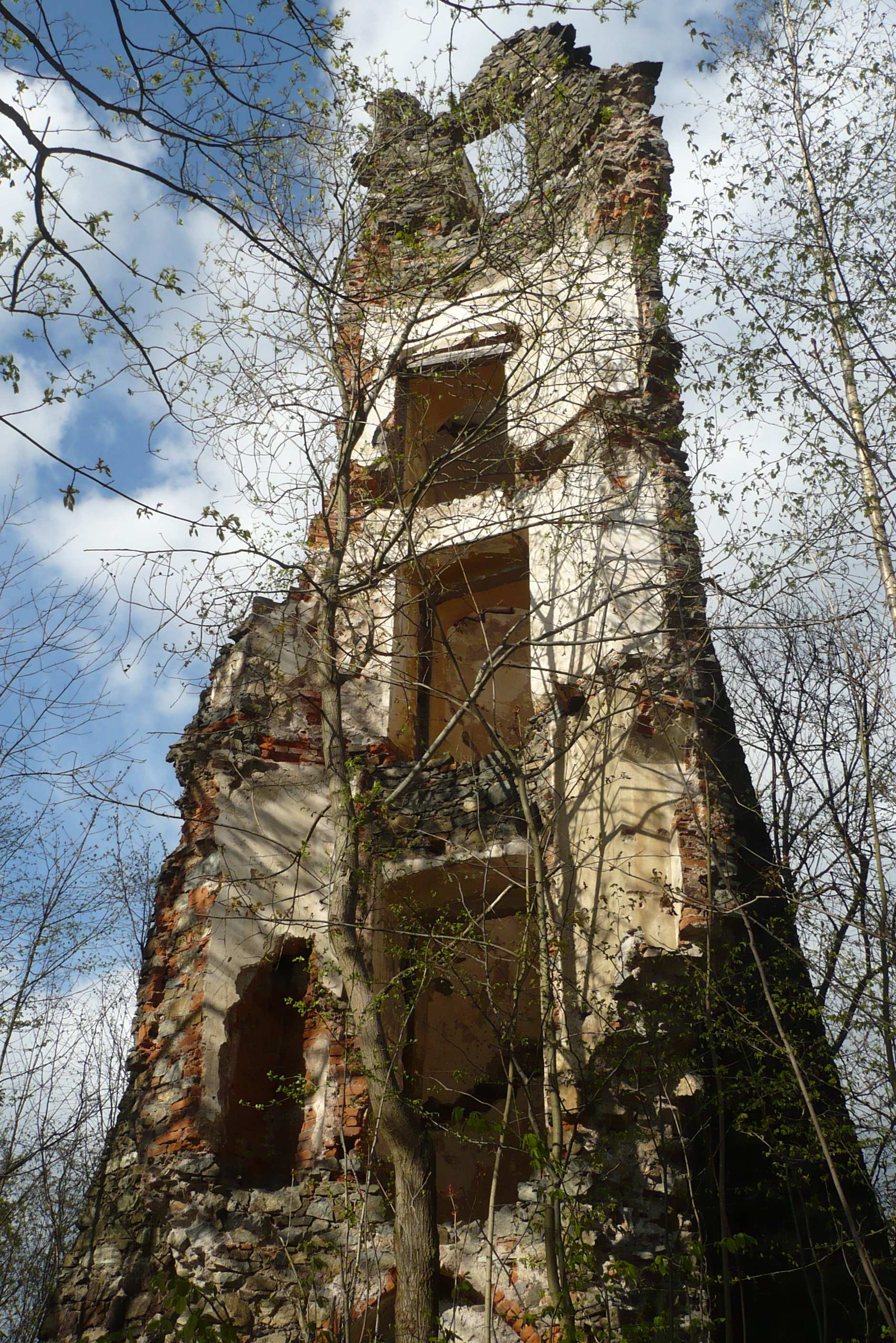 Wieża na Grodziszczu